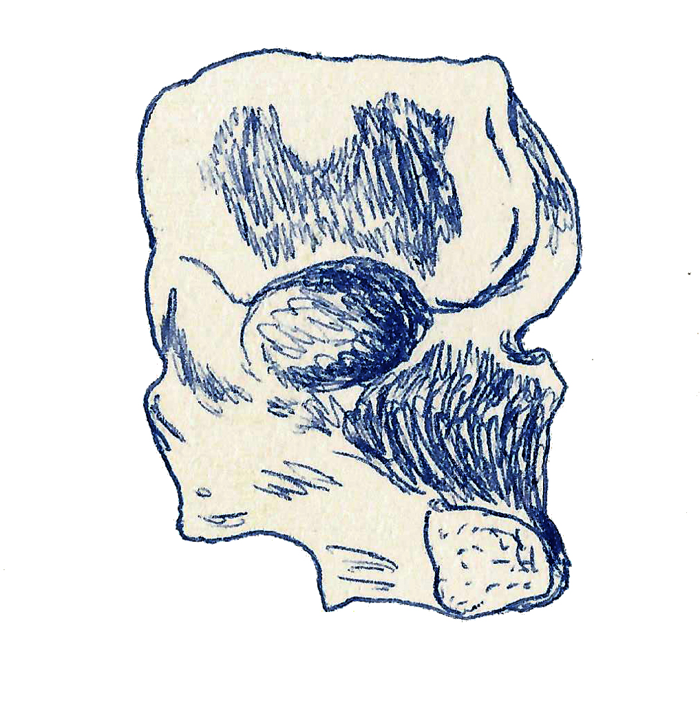 Illustration of a fossil of Compsosuchus